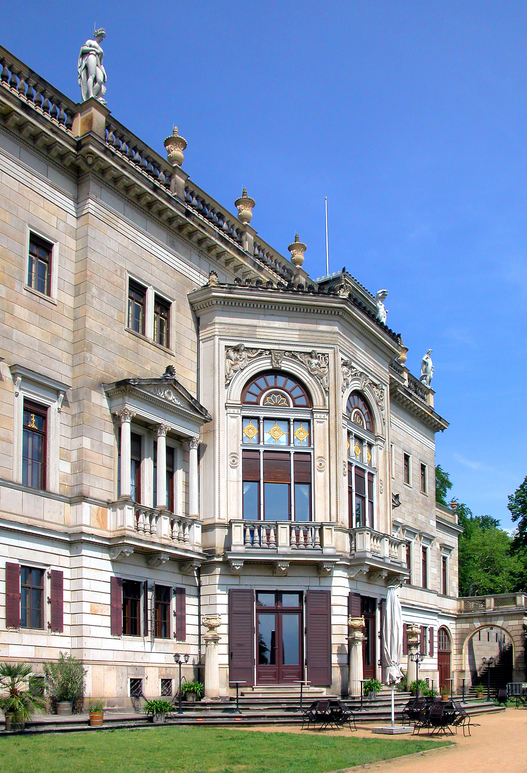 14.05.2007 01099 Dresden, Bautzner Str. 130 (GMP: 51.064840,13.795225): Schloß Albrechtsberg, Sicht von Norden. Spätklassizistisch (1850-1854) von Adolf Lohse. Elb- fassade von Südwesten. [DSCN27968.TIF]20070514020DR.JPG(c)Blobelt